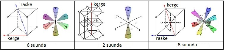 Magnetokristallilise anisotroopia kerged ja rasked suunad.